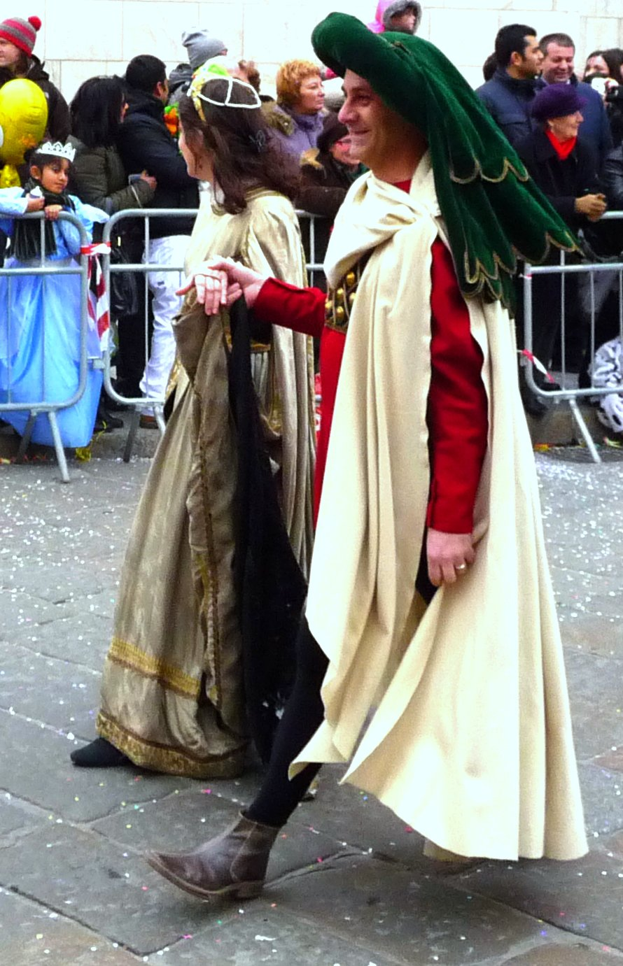 Corteo Storico Carnevale Ambrosiano 2011. Dettaglio di scatto fotografico personale (soggetto Michele Sebastiano Ferullo (Effems)) commissionato ed eseguito da Maria Patrizia Rossitto. Pubblicazione su gentile concessione dell'autrice.